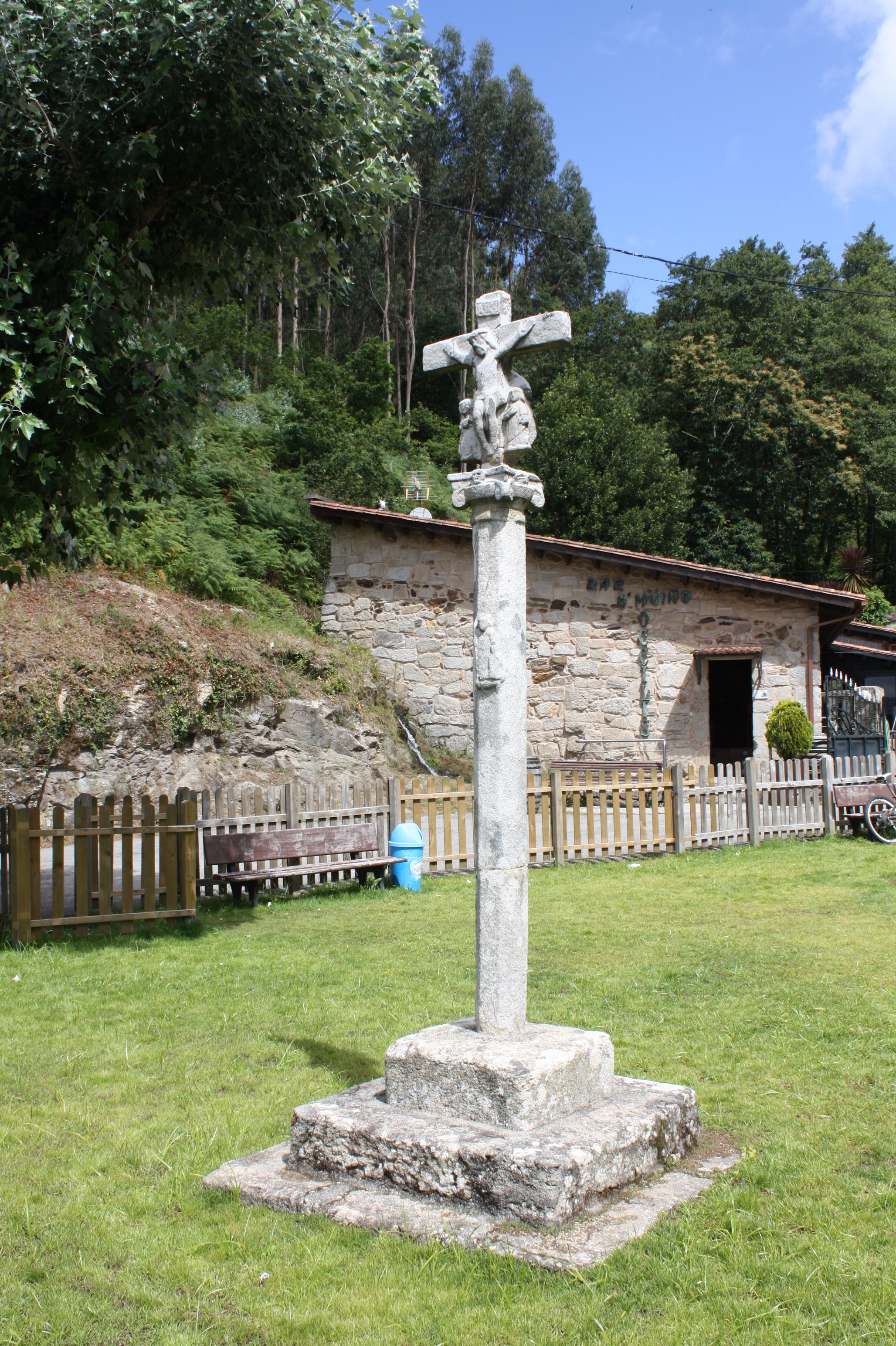 Cruceiro no lugar de Chan de Vila, parroquia de Bordóns, concello de Sanxenxo (Pontevedra)